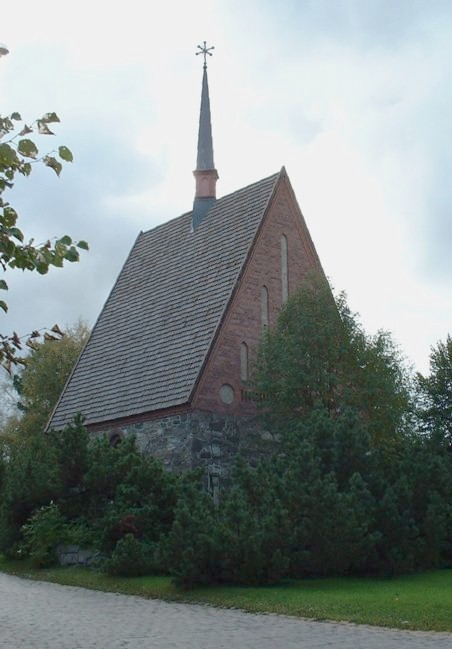 Kivisakasti, Mikkelin vanhin rakennus. Rakennuksen goottilaistyylinen yläosa ei ole alkuperäinen, vaan 1800-luvun lopussa tehdystä kunnostuksesta.